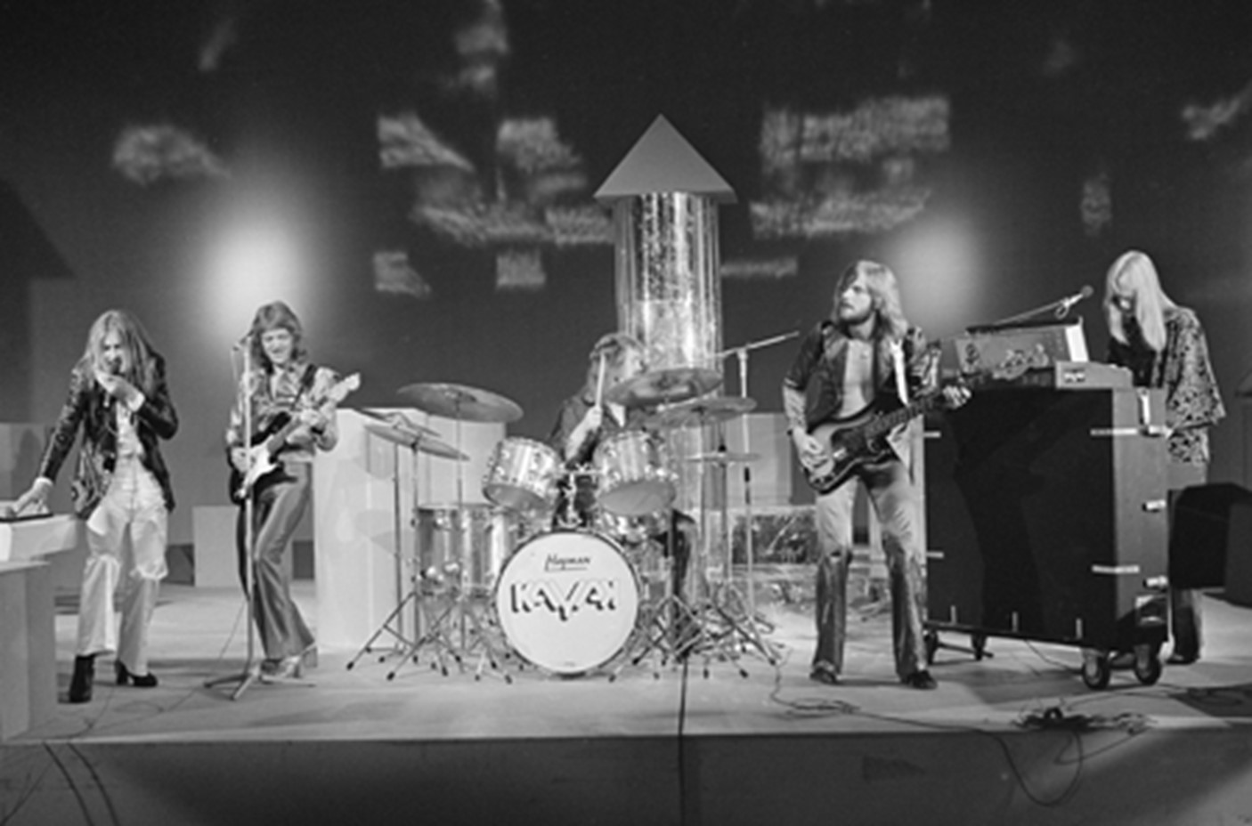 Toppop, optreden Kayak, 28-8-1974, Van links naar rechts: Max Werner, Johan Slager, Pim Koopman, Bert Veldkamp, Ton Scherpenzeel. Zendgemachtigde AVRO, Archief Beeld en Geluid, catalogusnummer 74666, fotonummer 26.